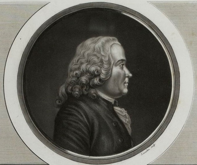 Chrétien-Guillaume. Malesherbes de Lamoignon, Musée de la Révolution française, Vizille